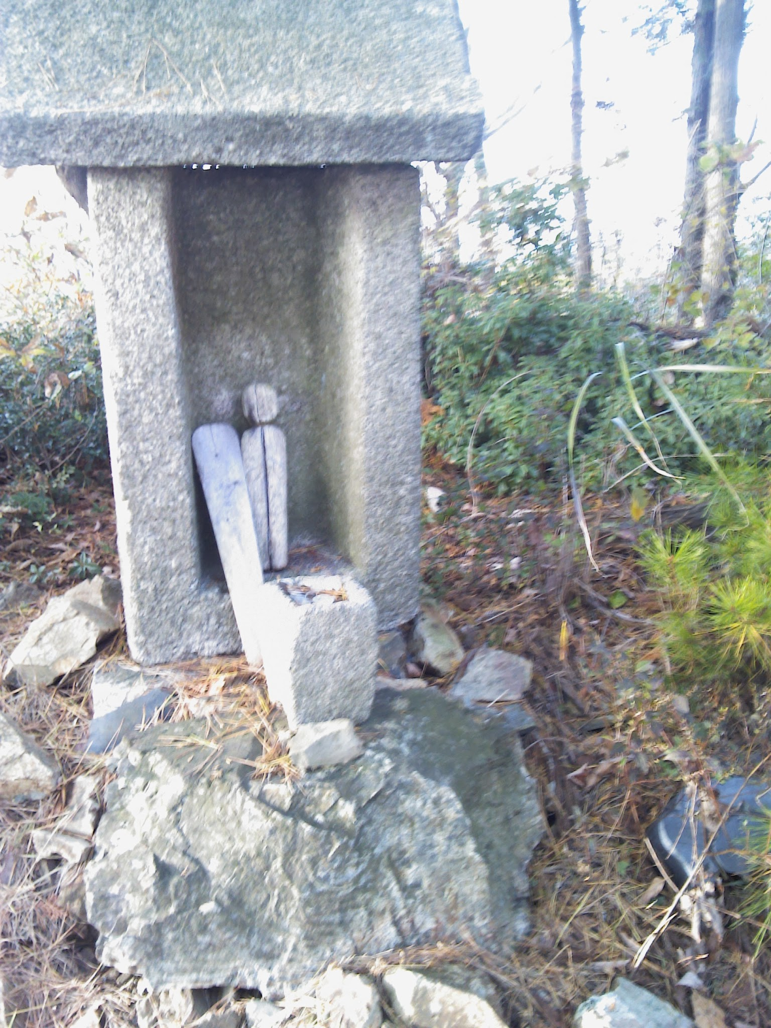 蓮華山 山頂